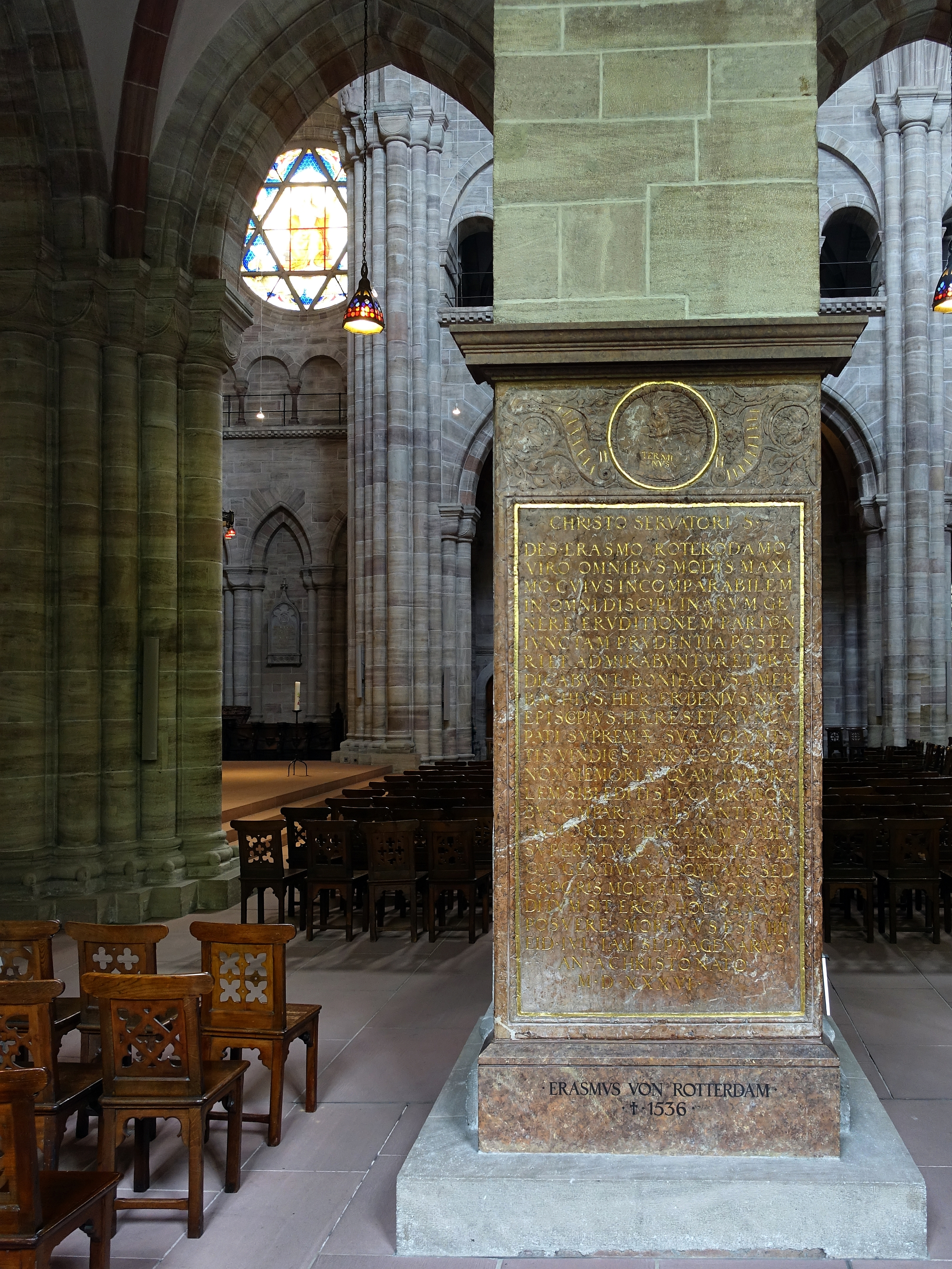 Erasmus von Rotterdam (1466/1467/1469–1536) Gelehrter, Humanist, Autor. Epitaph im Basler Münster. Im Jahre 1535 kehrte er nach Basel zurück und verstarb dort am 12. Juli 1536.